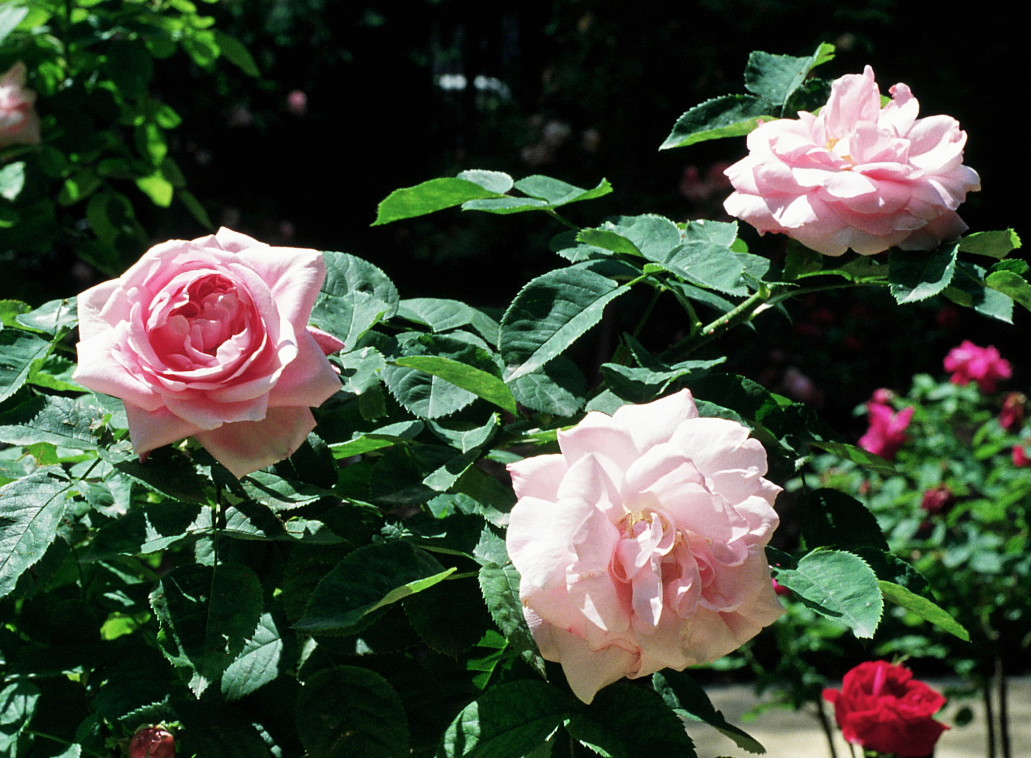 'Baroness Rothschild', Híbridos reflorecientes, sect. Rosa. Real Jardín Botánico, Madrid, mayo 1988, A. Barra